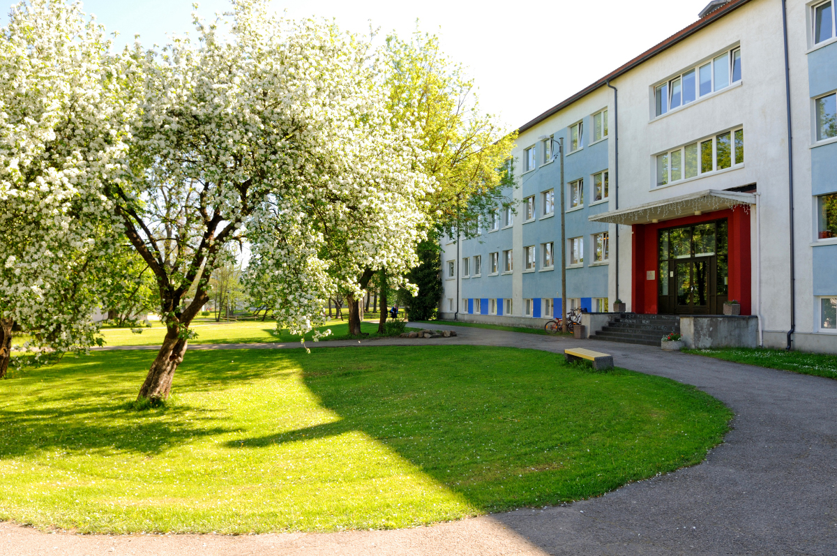 Audentese Erakooli väike koolimaja